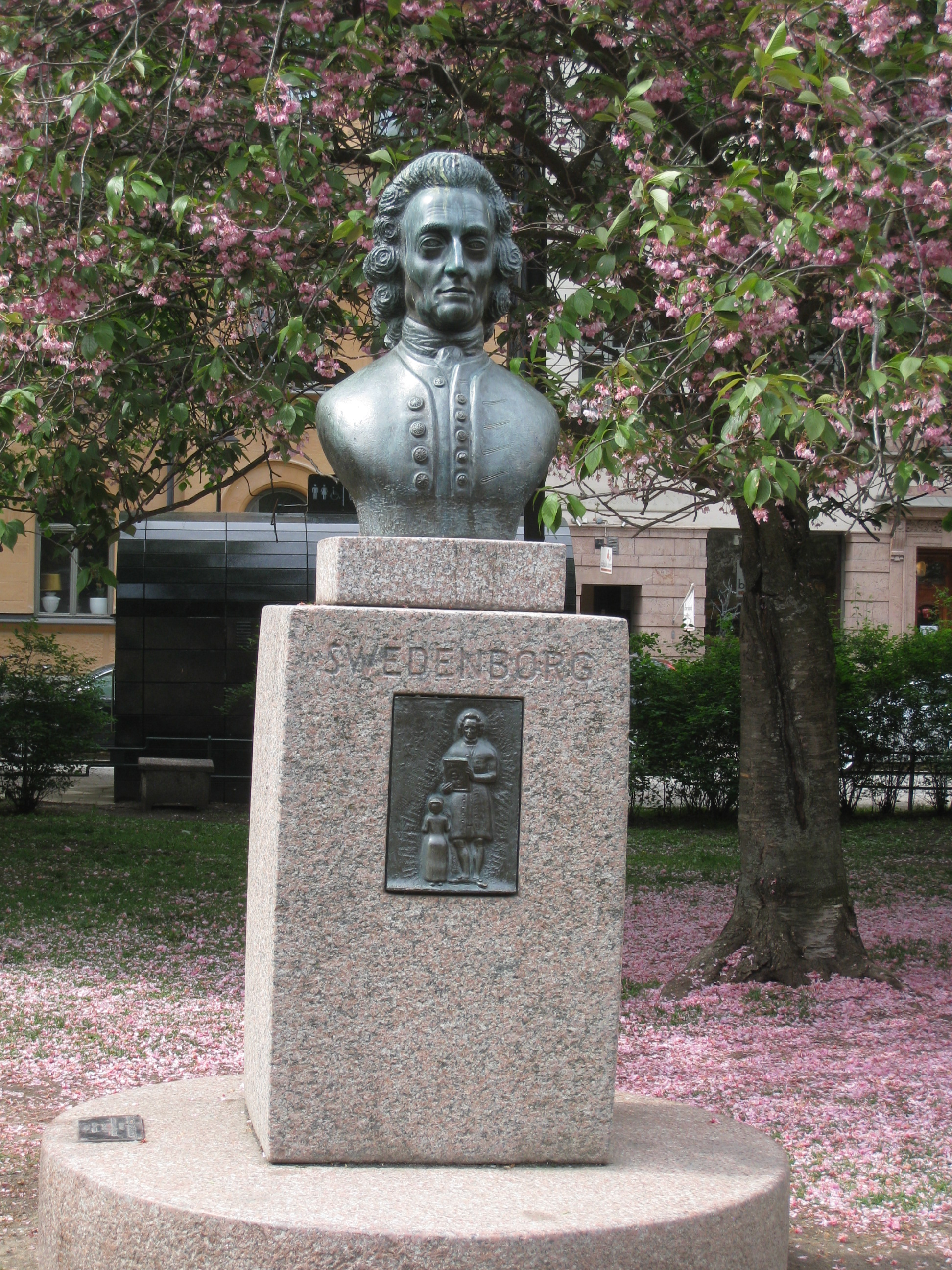 Emanuel Swedenborg (1688-1772), vetenskapsman och filosof, bronsbyst (1973), Mariatorget, av skulptören Gustav Nordahl (1903-1992).